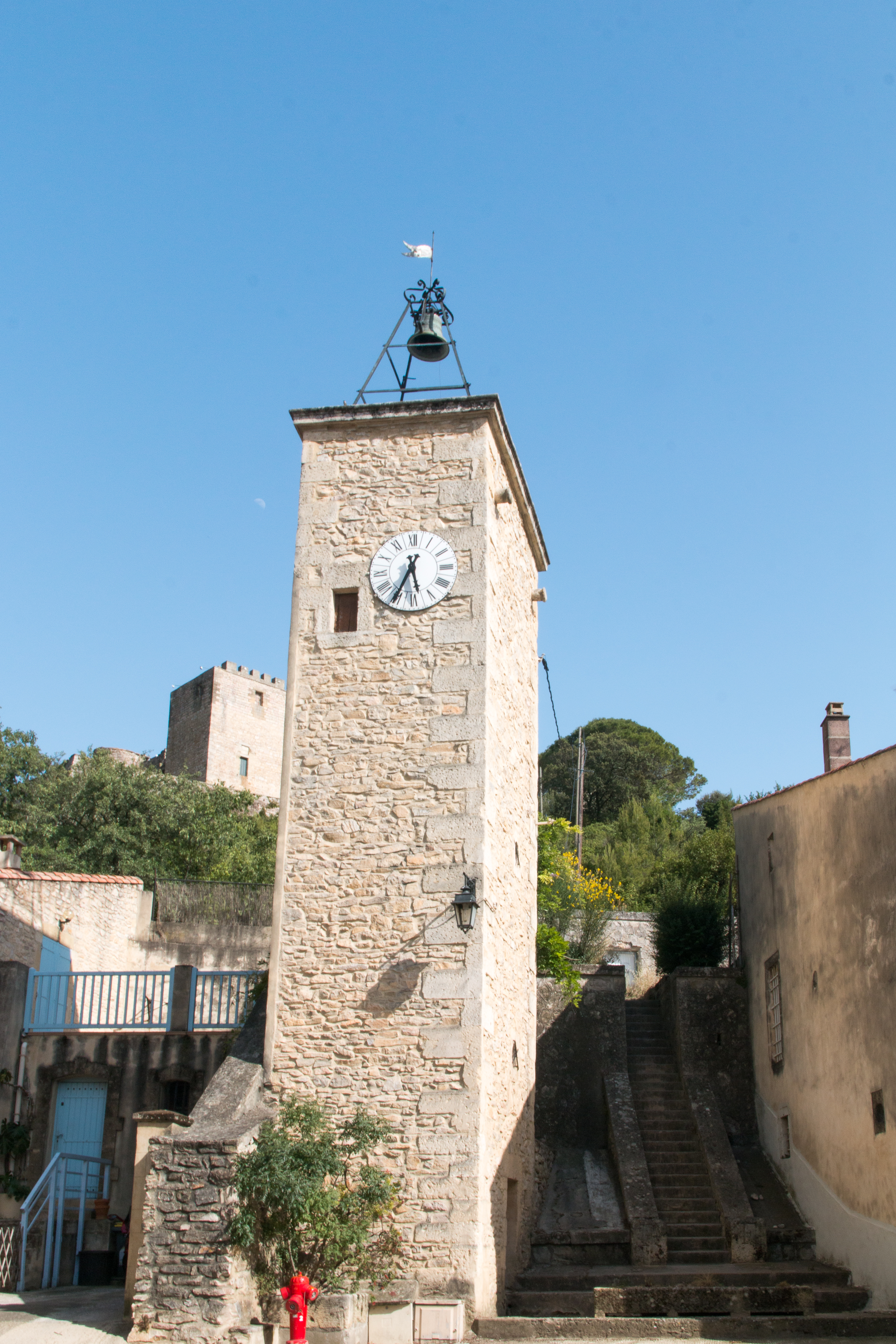 Towet clock at Boissières, Gard.